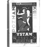 Katalog wystawy sztuki religijnej Grupy Artystycznej Plastyka z Poznania.